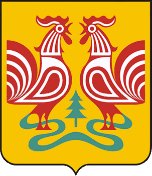 Герб города Петушки, Владимирская область